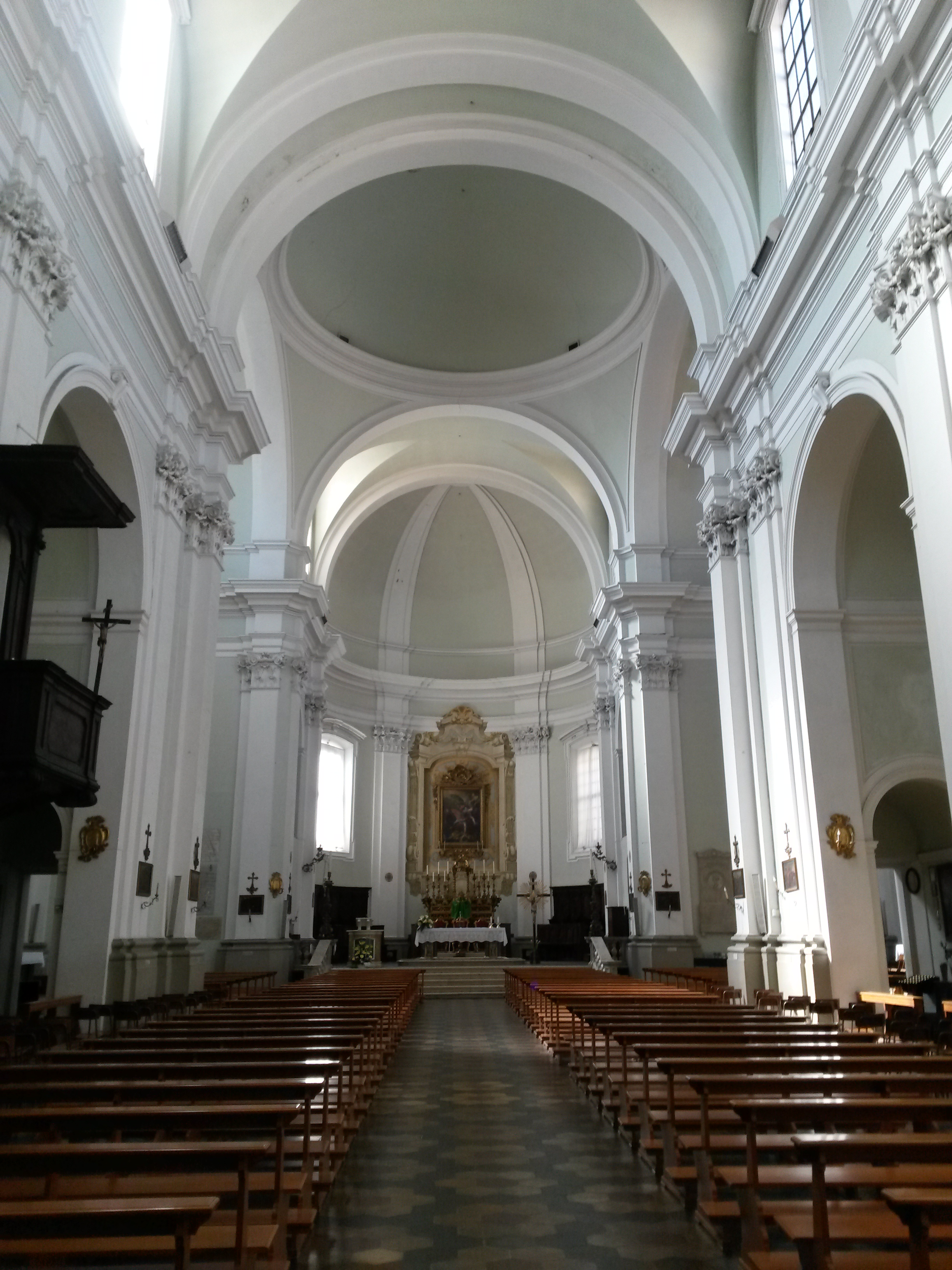 Chiesa Collegiata di Santarcangelo di Romagna (interior)